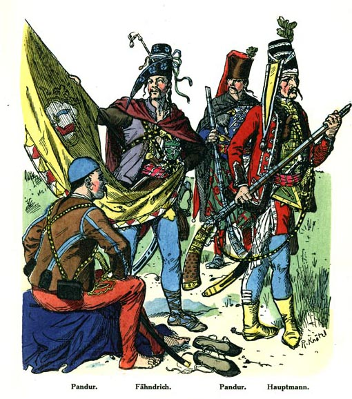 Kroatische Panduren um 1742